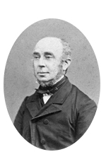 Franz Zacharias Ermerins